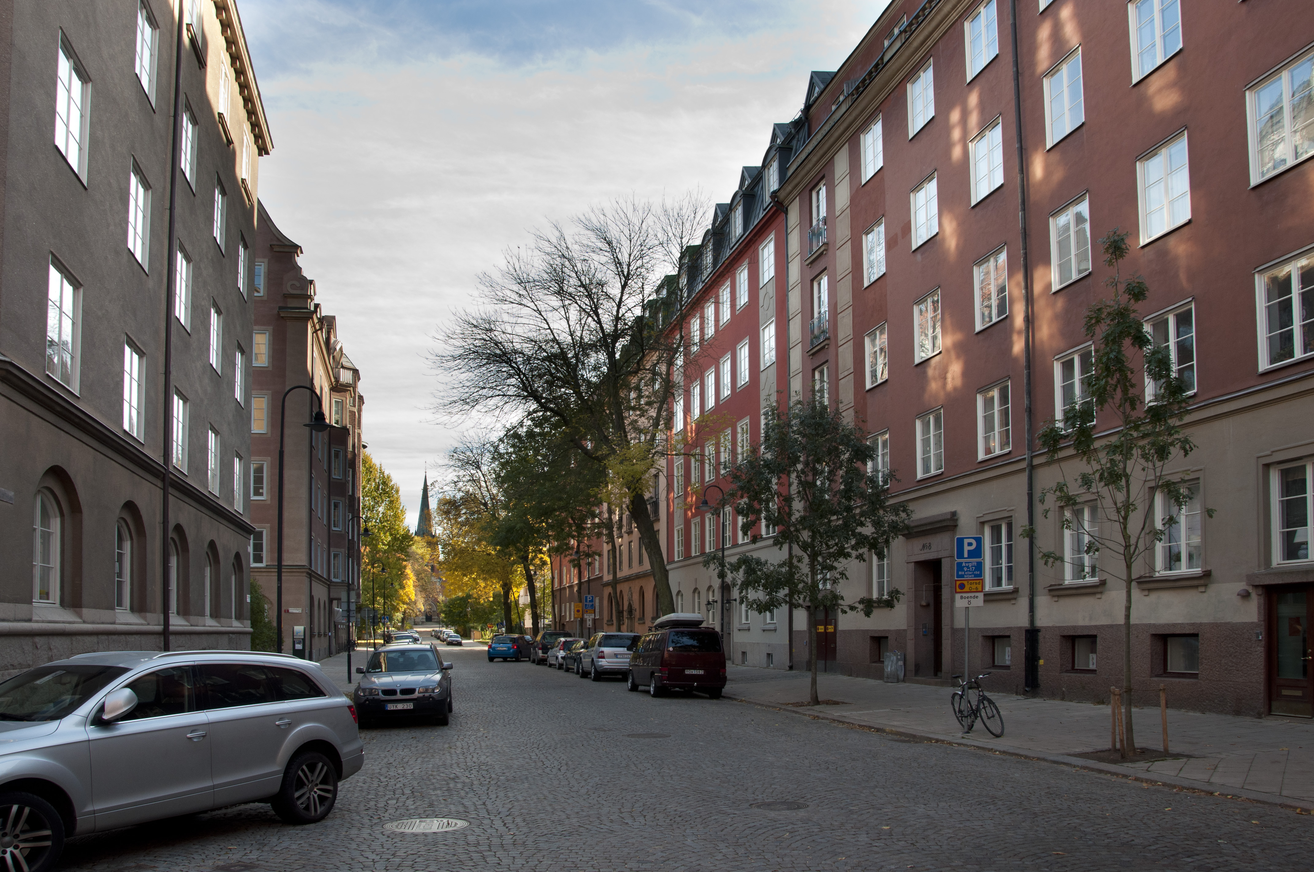 Wittstocksgatan